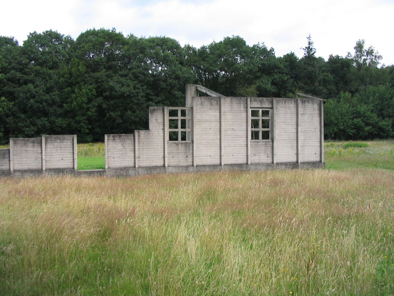 Uit eigen verzameling Hoewel vrijwel alle authentieke gebouwen van voormalig kamp Westerbork zijn verwijderd, staan op het voormalig kamp nog enkele voorwerpen die aangeven hoe de indeling op het kamp vroeger was. Op deze afbeelding is een deel te zien van een gebouw dat vroeger dienst deed als barak.